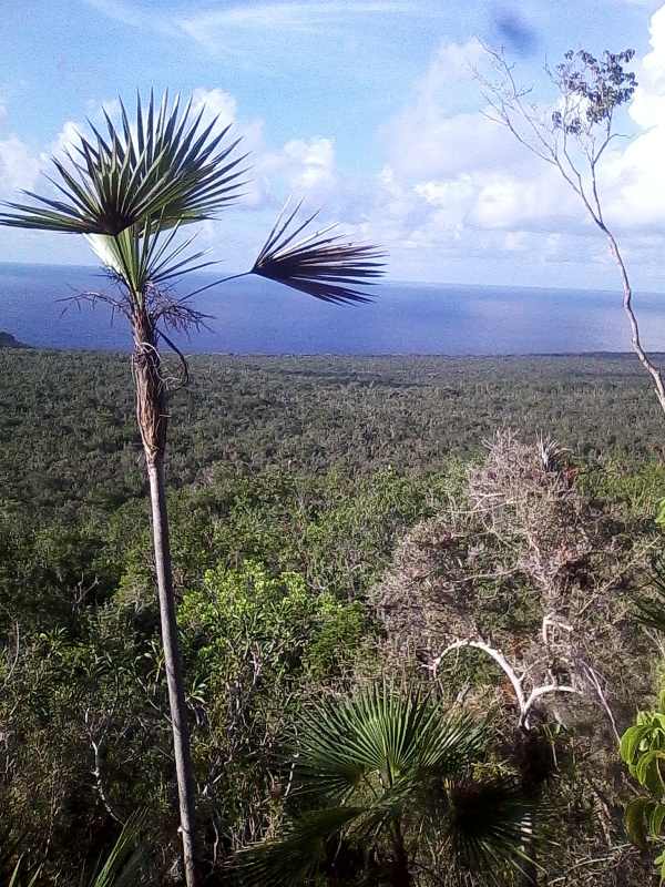 Vista desde la 4ta terraza en descenso al mar en el Parque Desembarco del Granma